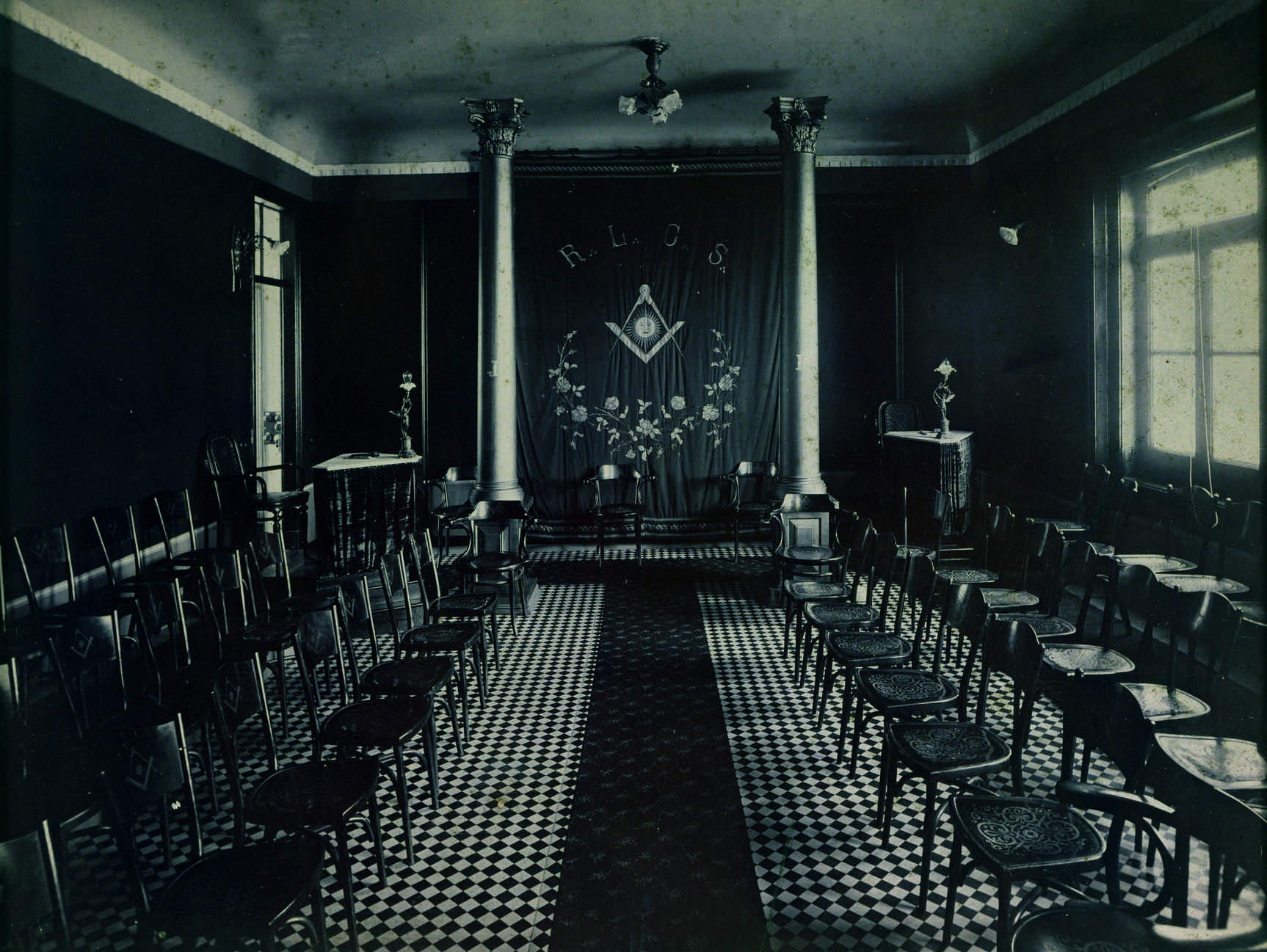 Fotografia, provavelmente da década de vinte do século XX, (195 x 150 mm) do Templo da Loja Cruzeiro do Sul em Lourenço Marques (actual Maputo). Esta Loja esteve em actividade entre 1900 e 1935, praticando o Rito Escocês Antigo e Aceito. Alguns Obreiros desta Loja integraram a Associação dos Velhos Colonos, fundada em 1919, e que após as perseguições de 1935 se substituíu às Lojas existentes em Moçambique. Esta associação viria a criar uma Escola industrial e de Artes decorativas, uma Escola Comercial, um Lar para a Terceira Idade, um posto médico e diversas instalações desportivas.